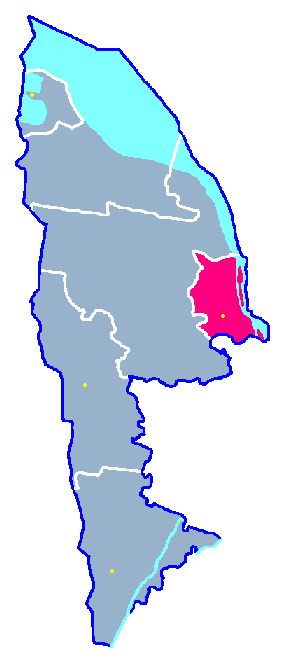 Miasto Police na planie powiatu polickiego Autor:Antares